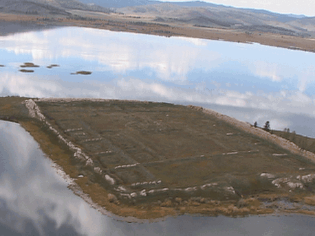 Крепость Пор-Бажын на озере Тере-Холь